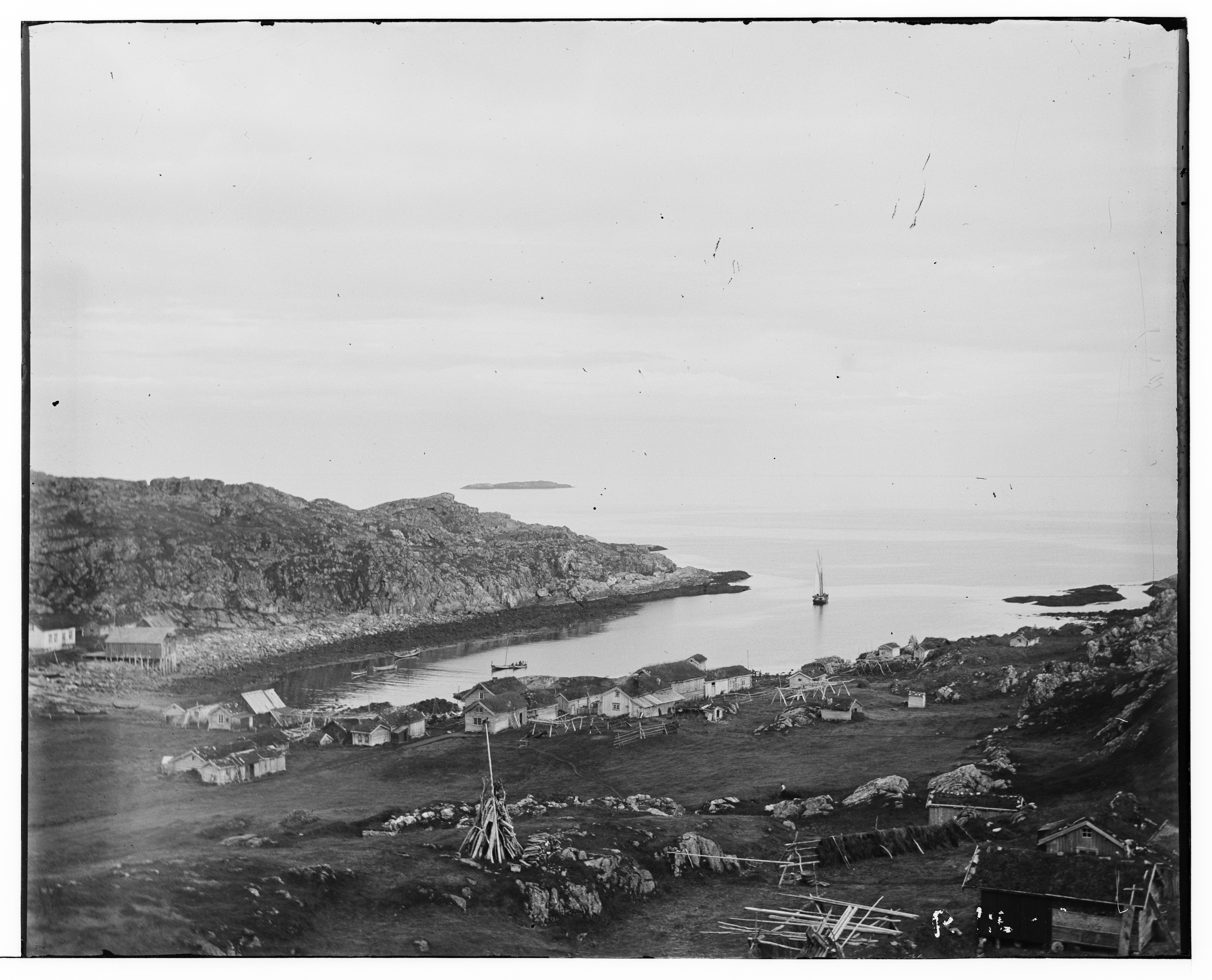 Bildet er hentet fra Arkivverket. Oversikt, Andsnes, Finnmark Arkivinstitusjon : Riksarkivet Arkivnavn : Havnedirektoratet Sted : Norge, , , Emneord: Kyst Avbildet